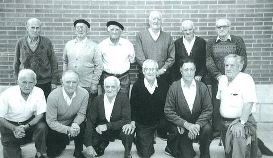 La Quinta del Biberón de Pradejón en 1998.